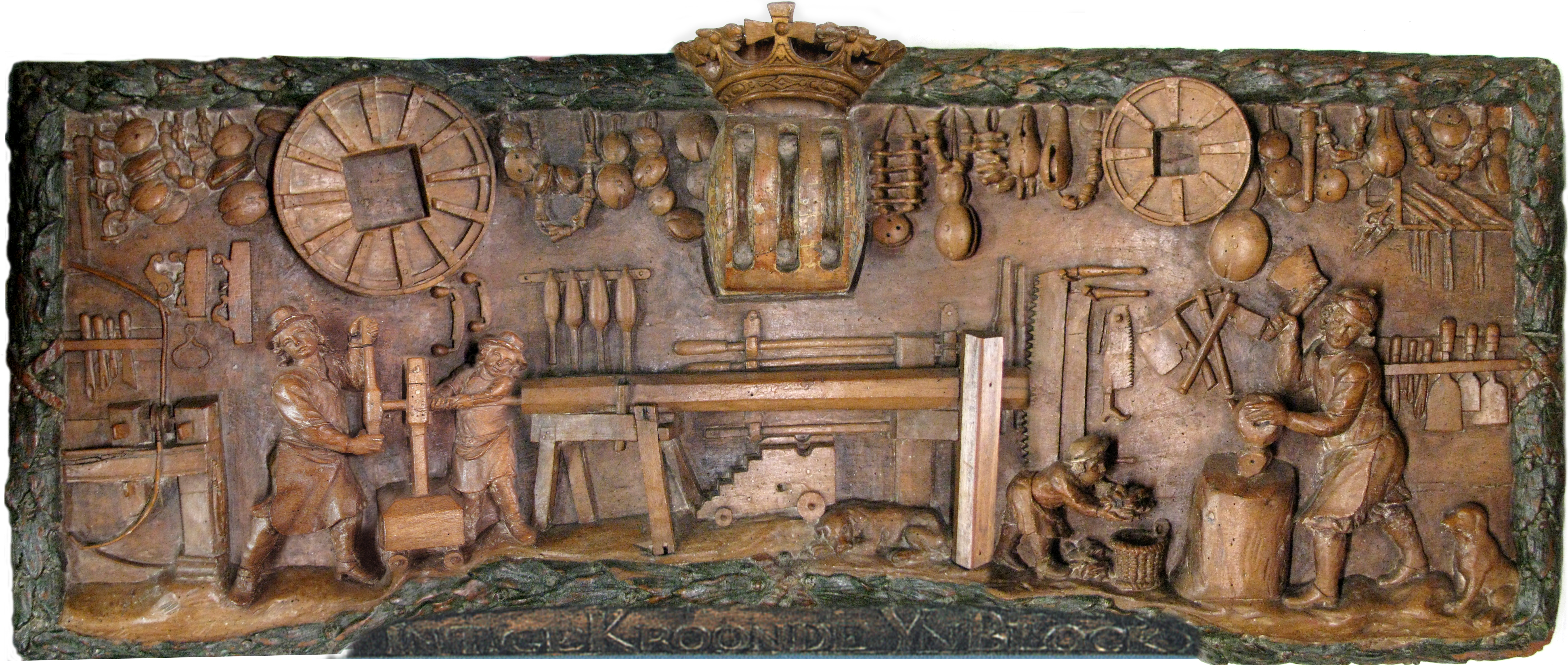 foto van een gevelbord